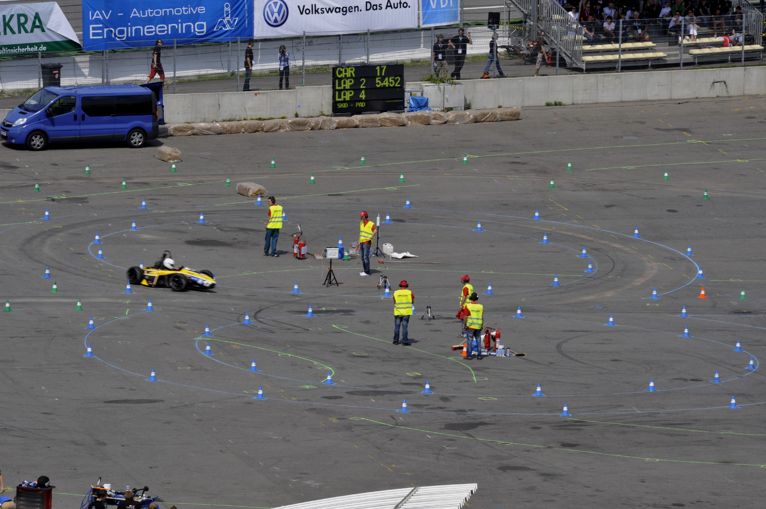 FSG Skid Pad